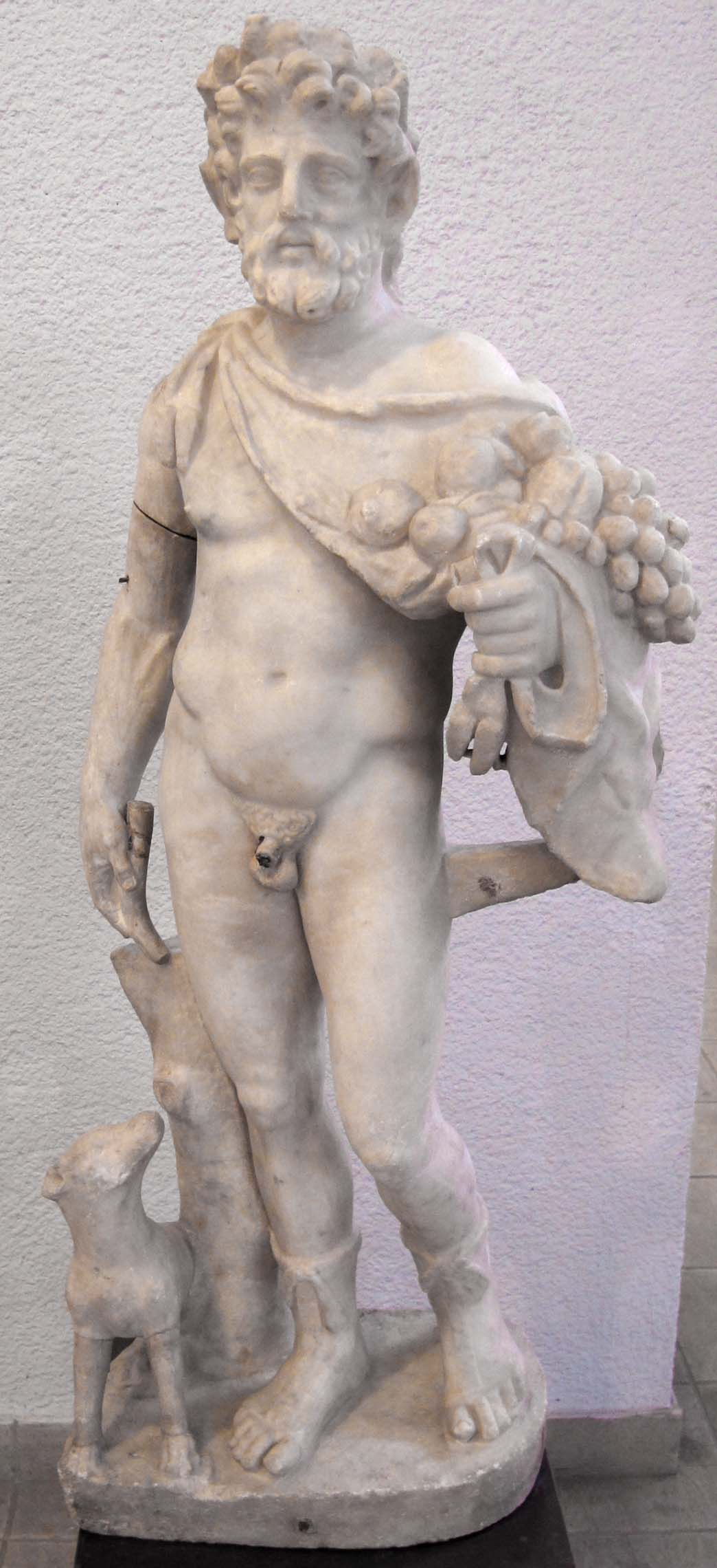 Statua di silvano forse da italia, II-III sec